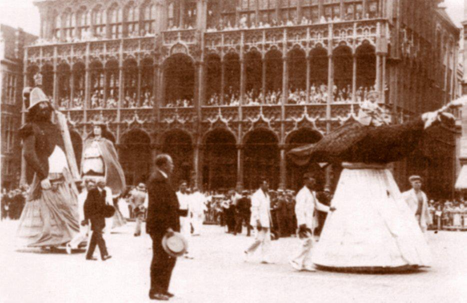 Les géants d'Ath sur la Grand'Place de Bruxelles en 1935 à l'oc­casion de l'Exposition universelle.